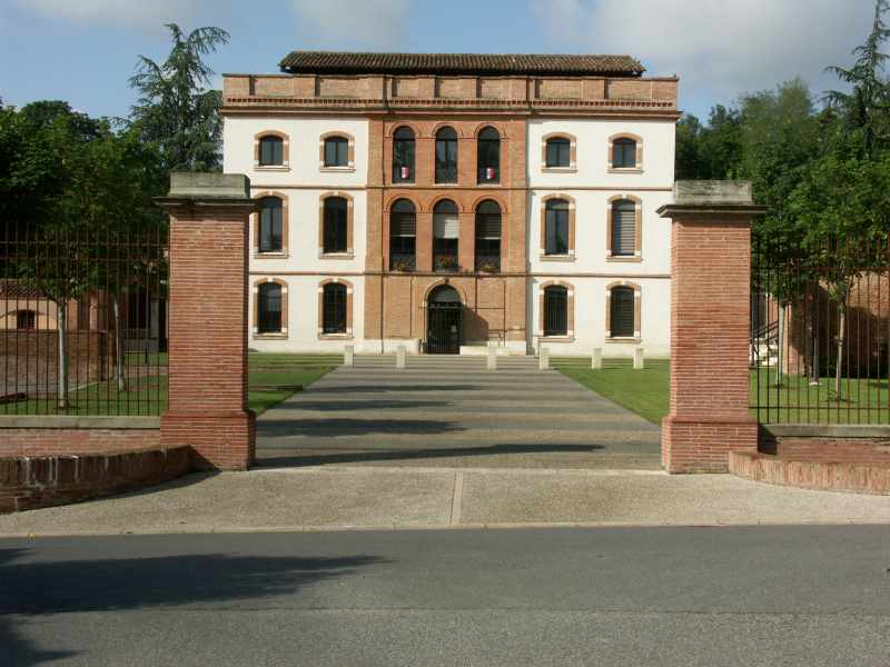 France, Haute-Garonne (31), Ayguesvives, mairie